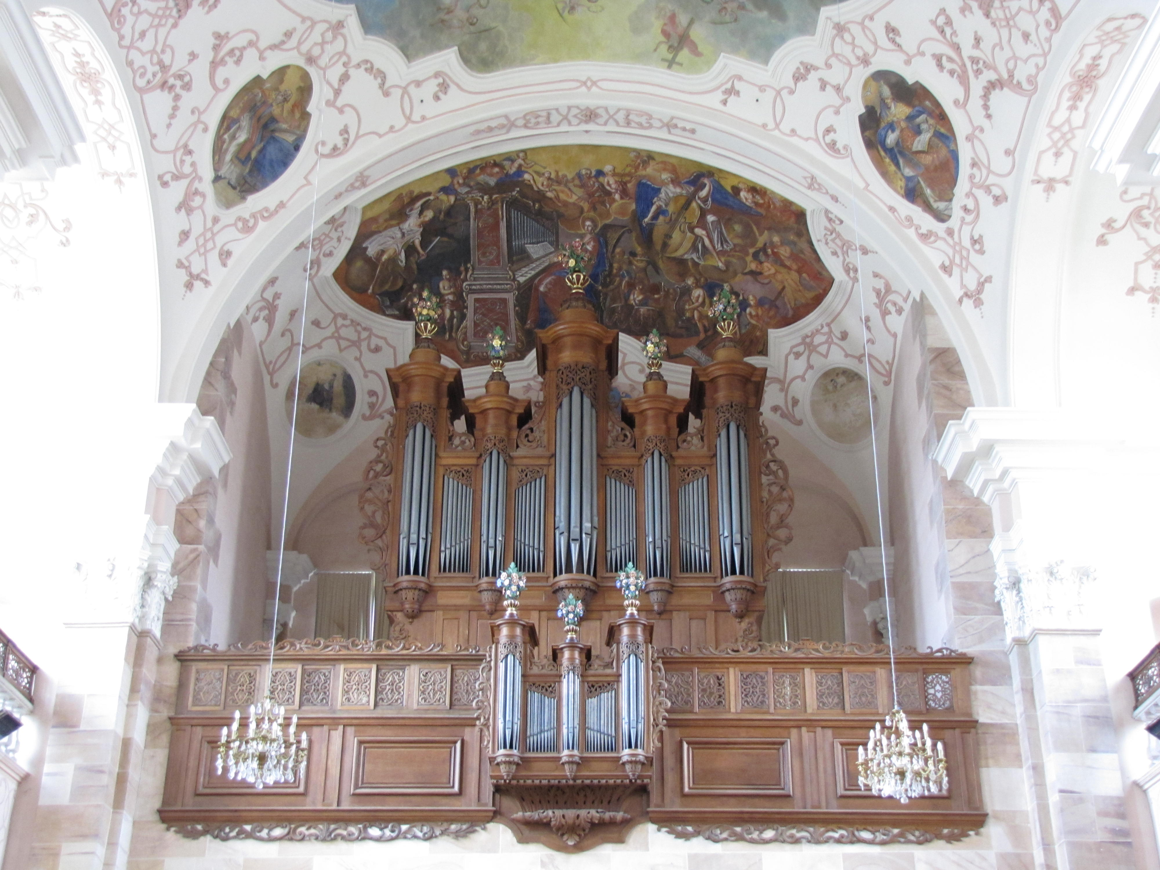 Alsace, Bas-Rhin, Église abbatiale Saint-Maurice d'Ebersmunster (PA00084701, IA00124485). Orgue André Silbermann (1730): This object is classé Monument Historique in the base Palissy, database of the French furniture patrimony of the French ministry of culture, under the references PM67001009 and IM67007579. Peinture monumentale (1727): Sainte-Cécile. This object is indexed in the base Palissy, database of the French furniture patrimony of the French ministry of culture, under the references IM67007570 and IM67007571.